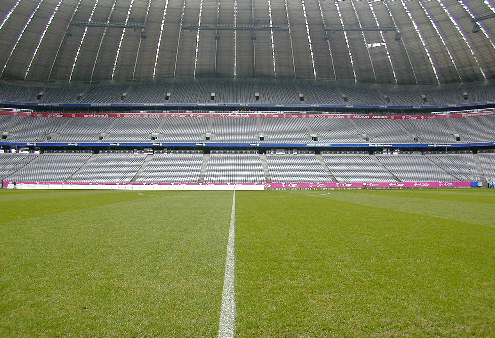 leere Allianz-Arena